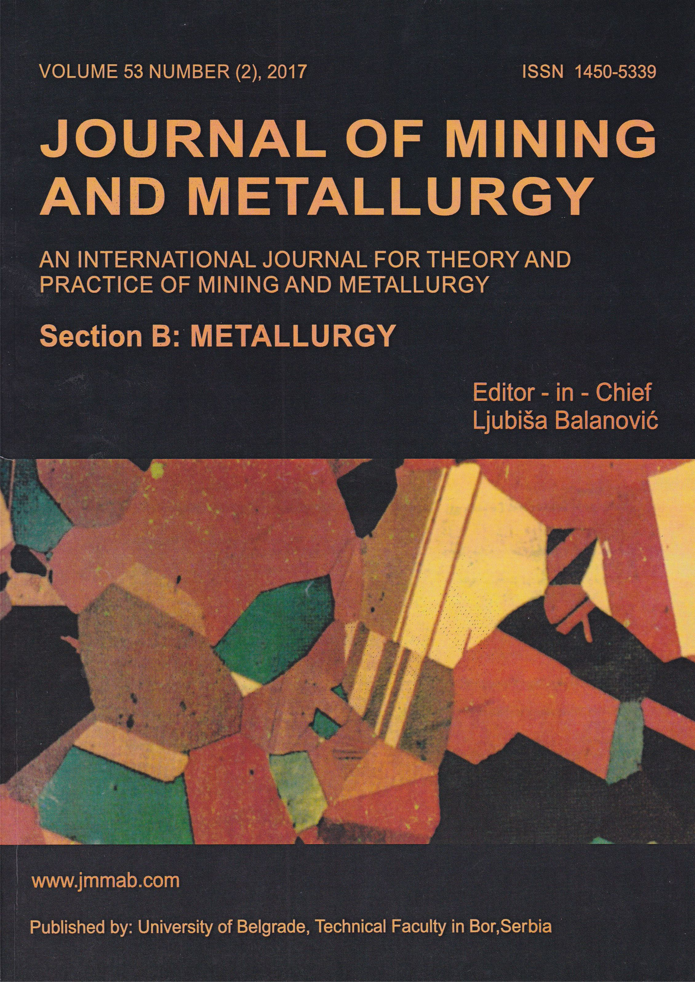 Journal of Mining and Metallurgy, Section B: Metallurgy представља међународни часопис за објављивање оригиналних истраживања које доприносе развоју теорије и праксе у металургији.